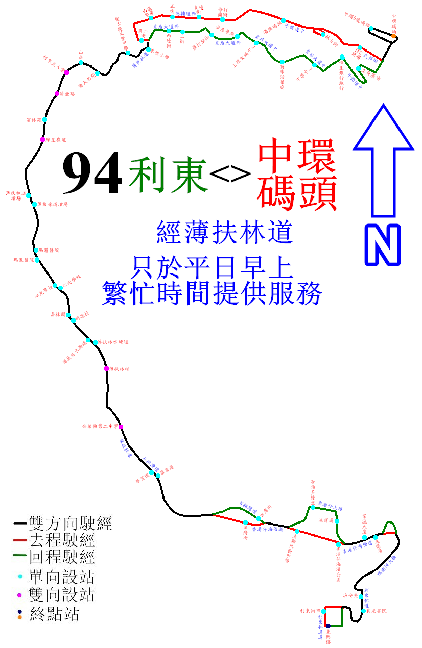 中文（香港）: 新巴94線的走線圖